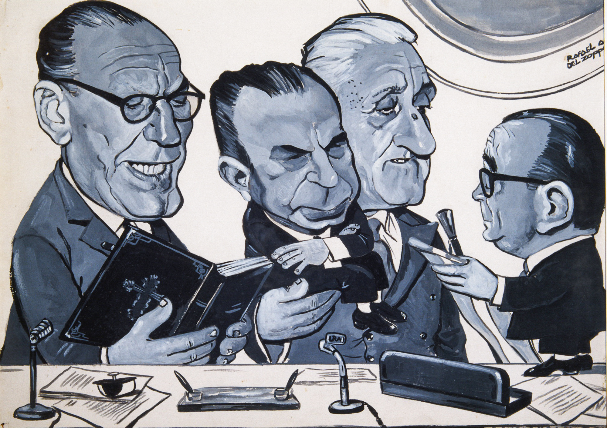 Parado sobre el escritorio, el Presidente saliente José María Guido (de muy baja estatura) hace entrega de la Banda Presidencial y el Bastón de Mando al Presidente Arturo Illia, que sostiene en brazos a su Vicepresidente Carlos Perette (también petiso). En la caricatura aparece asimismo el Escribano de Gobierno, Jorge Garrido.